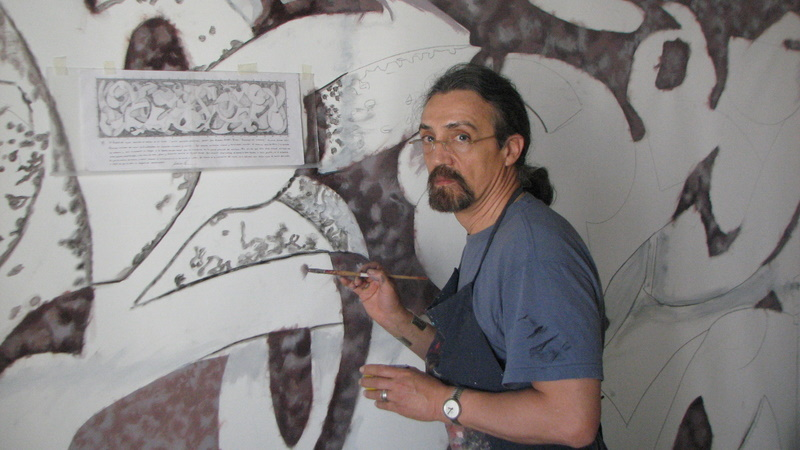 Julio Carrasco Breton pintando el mural "Epopea del Intelecto" - 2009, 200 cm x 720 cm para la Organisazion Mondiale de la Propriedad Intelectuale, Geneva - Suissa